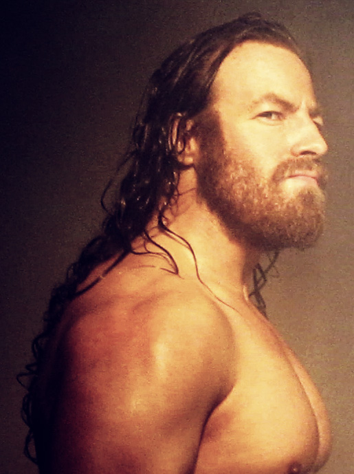 Starbuck